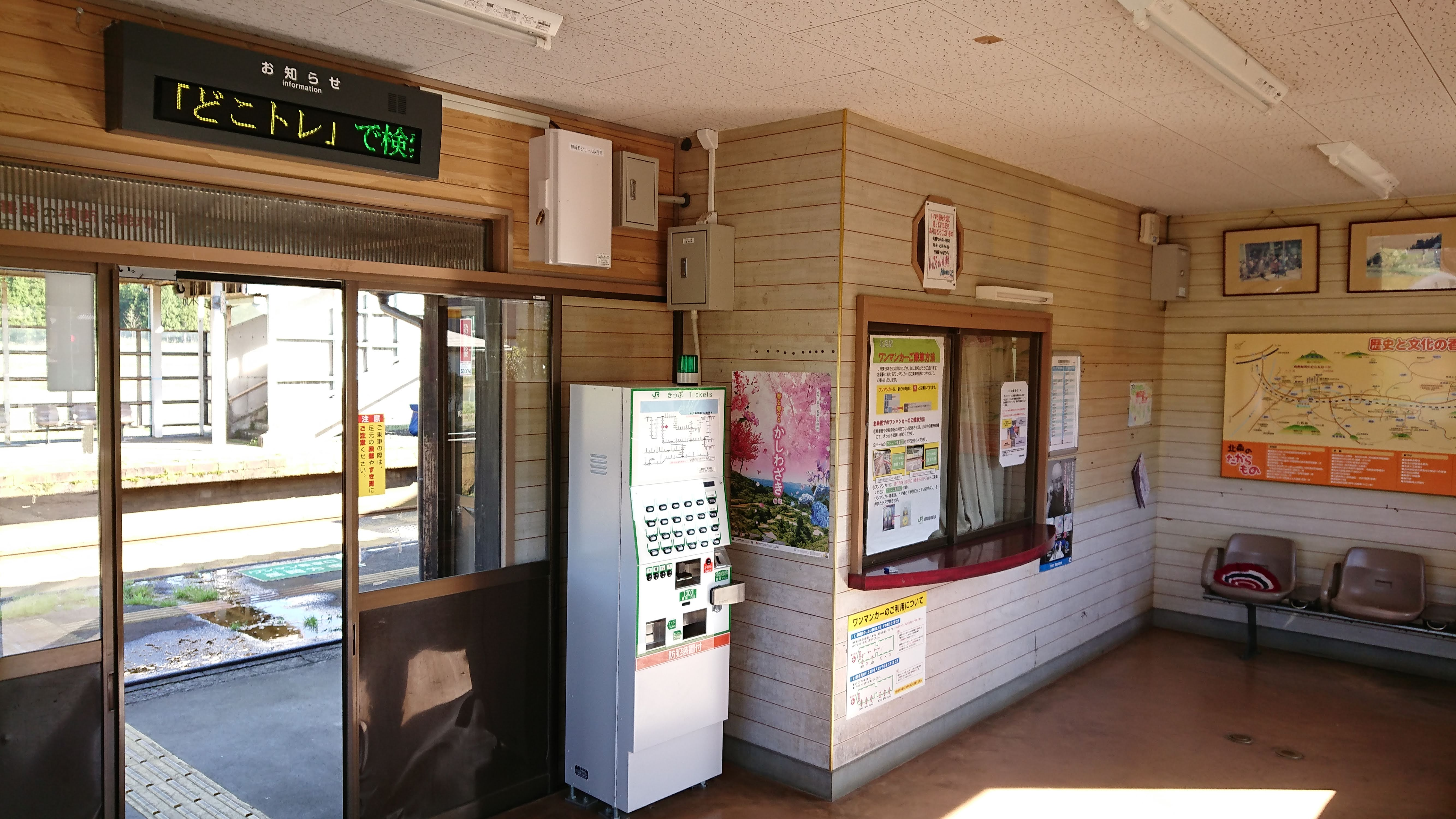 北条駅のコンコース、簡易委託駅時代の窓口がそのまま残されている。